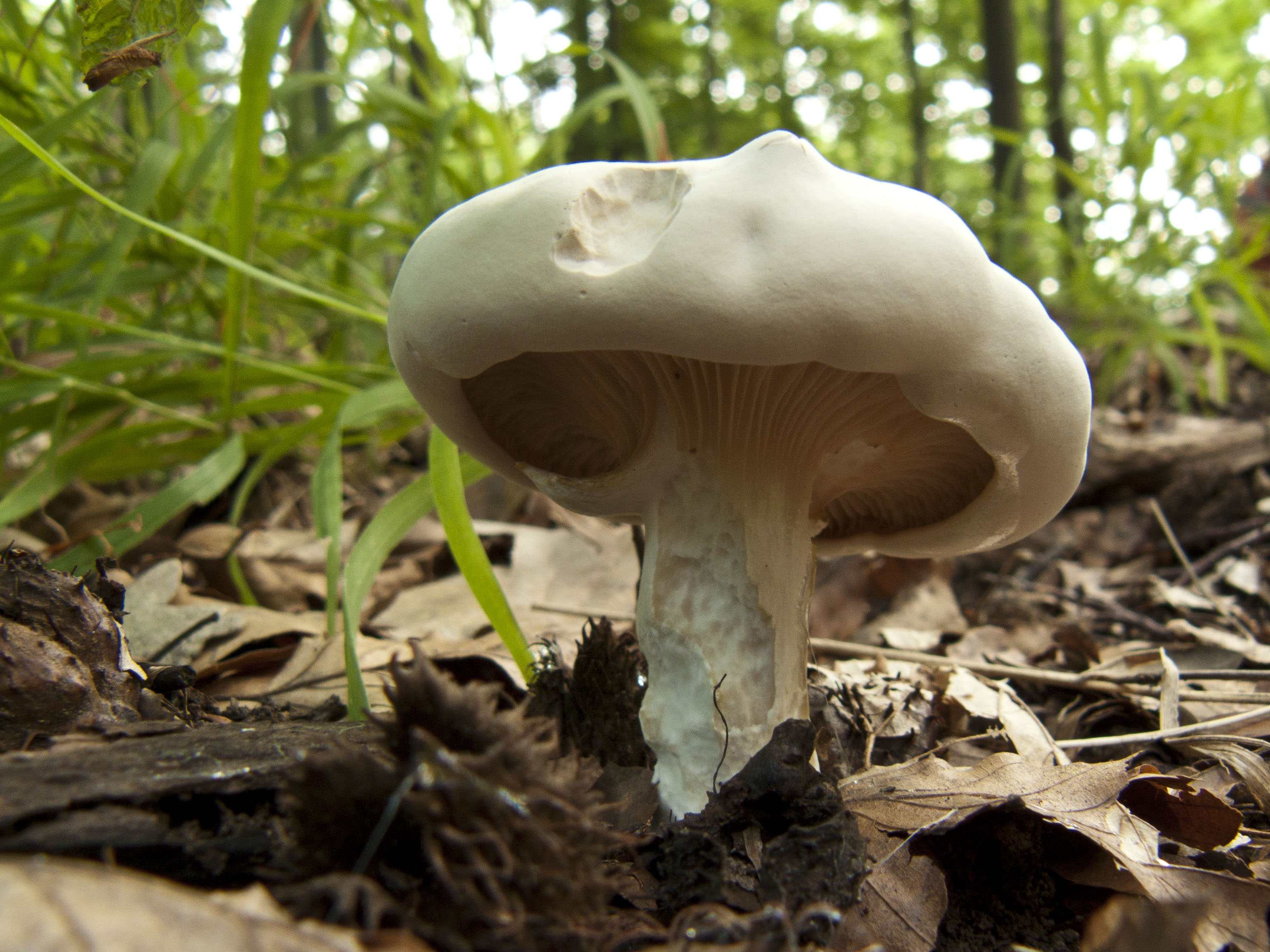 Osinalické bučiny. Mechovka obecná.